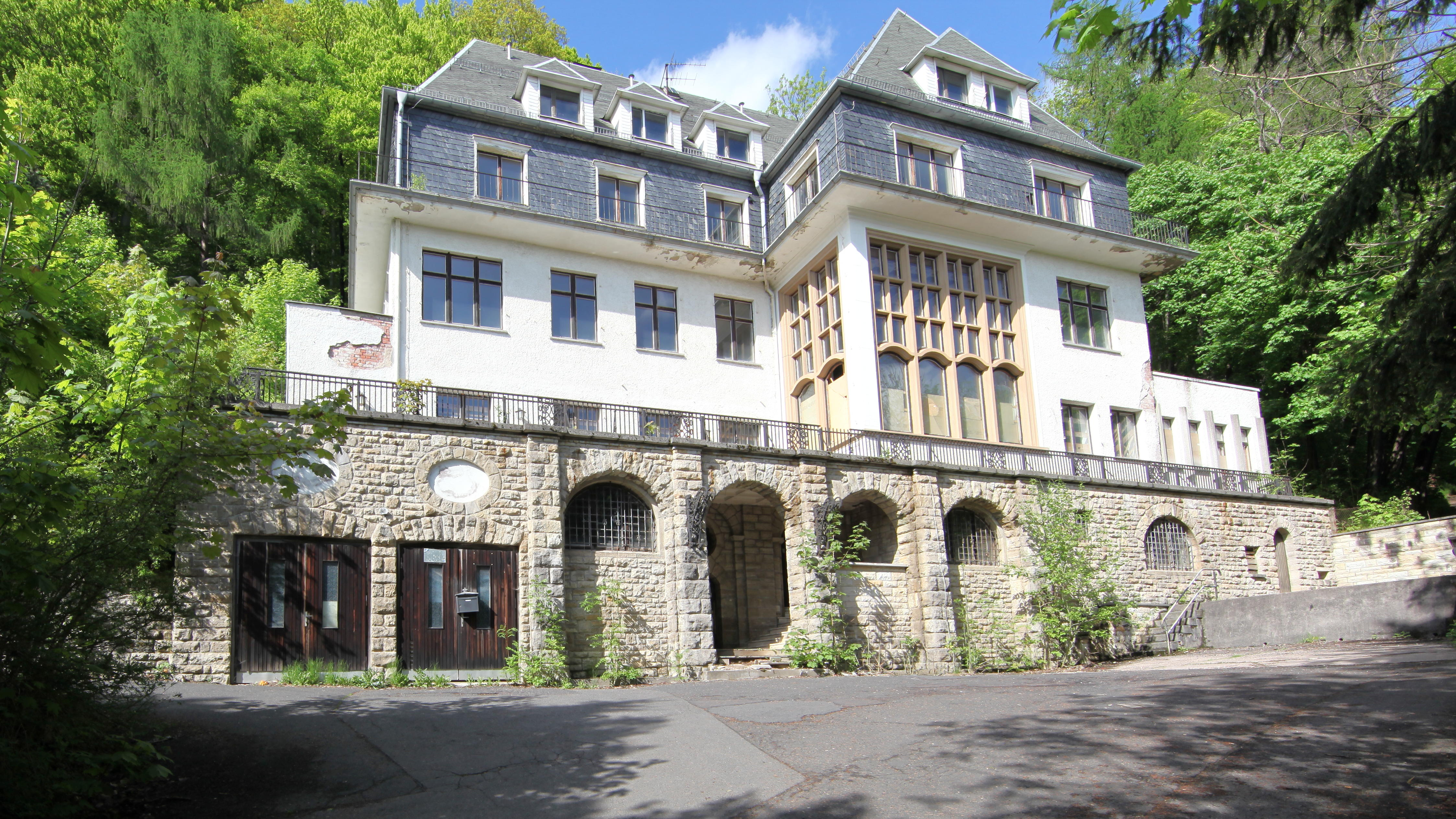 Villa der Familie Simson aus dem Jahr 1912 am Domberg in Suhl, nach Plänen von Hermann Muthesius errichtet